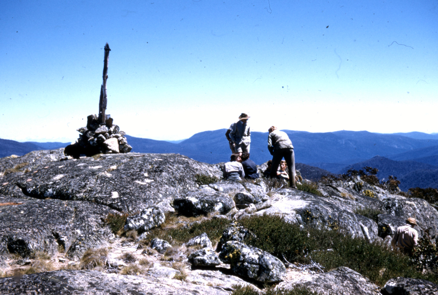 Gwen Jack Leslie Bagnall Rupert Bimberi